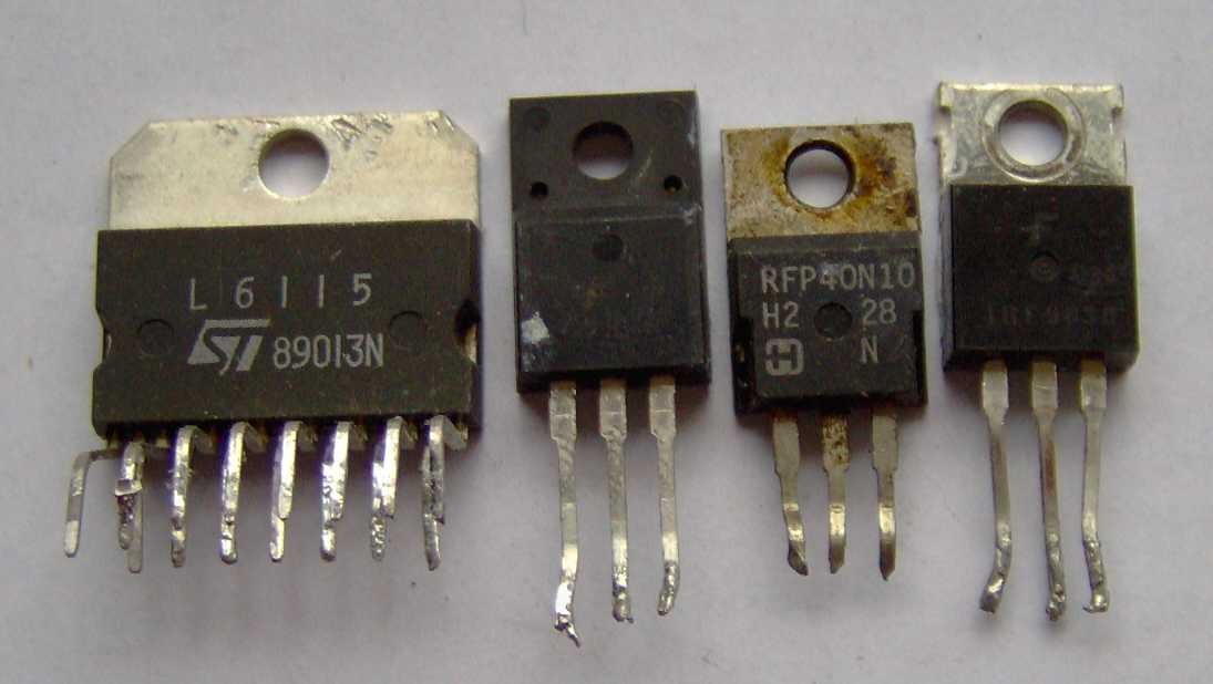 Electronic component - various unipolar power transistors